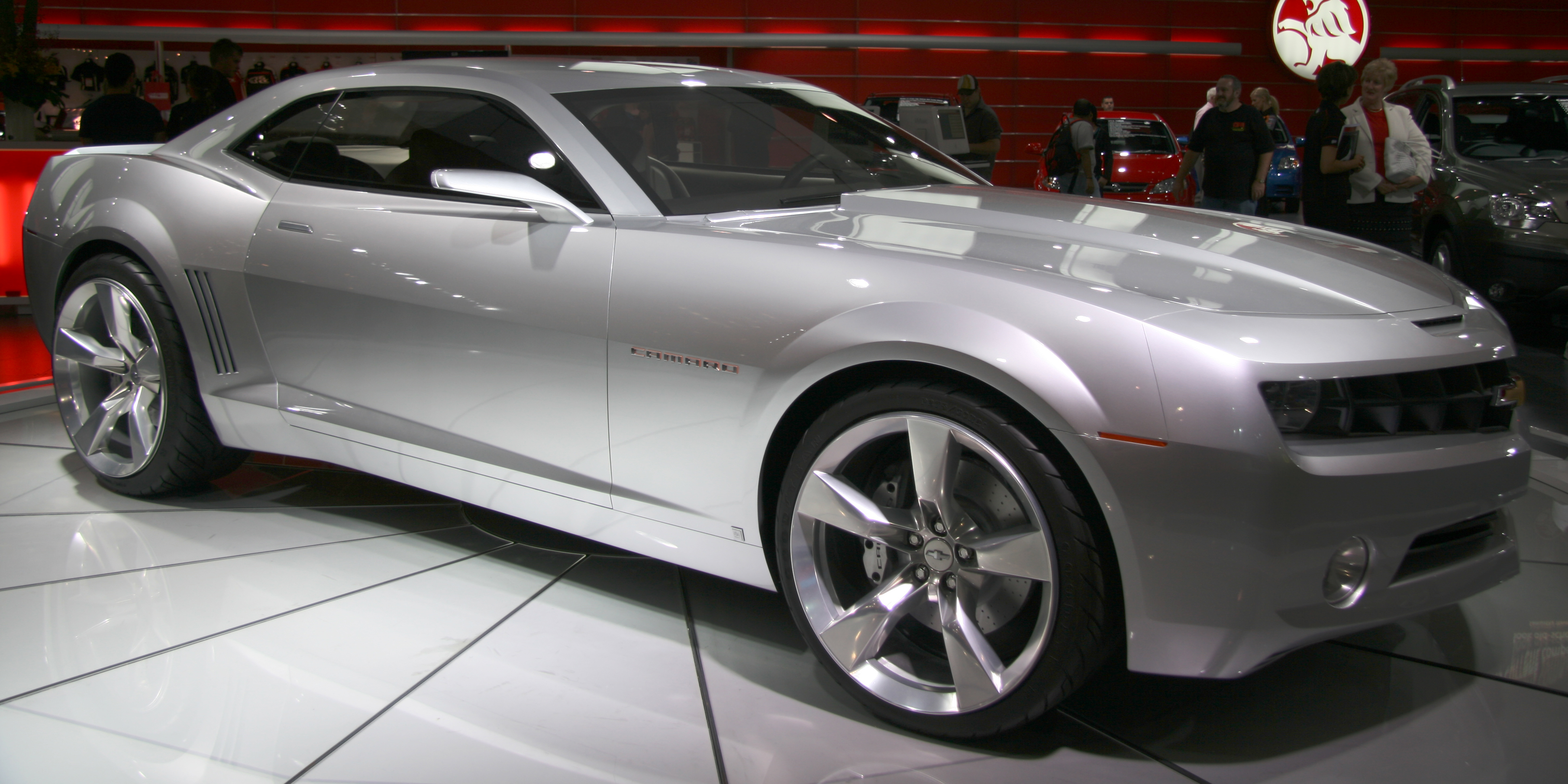 2006 Camaro Concept